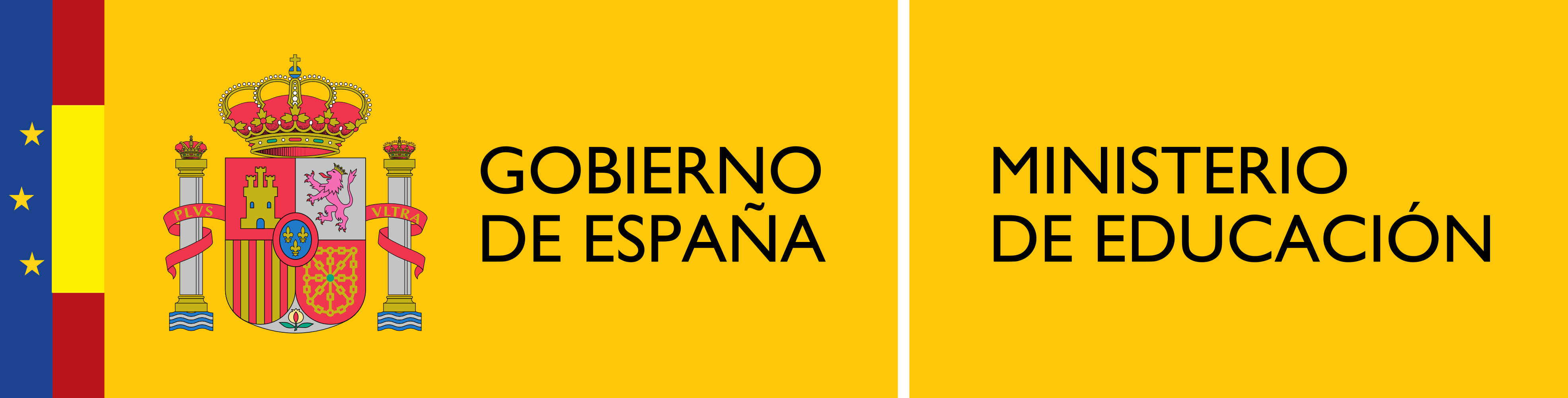 Logotipo del Ministerio de Educación